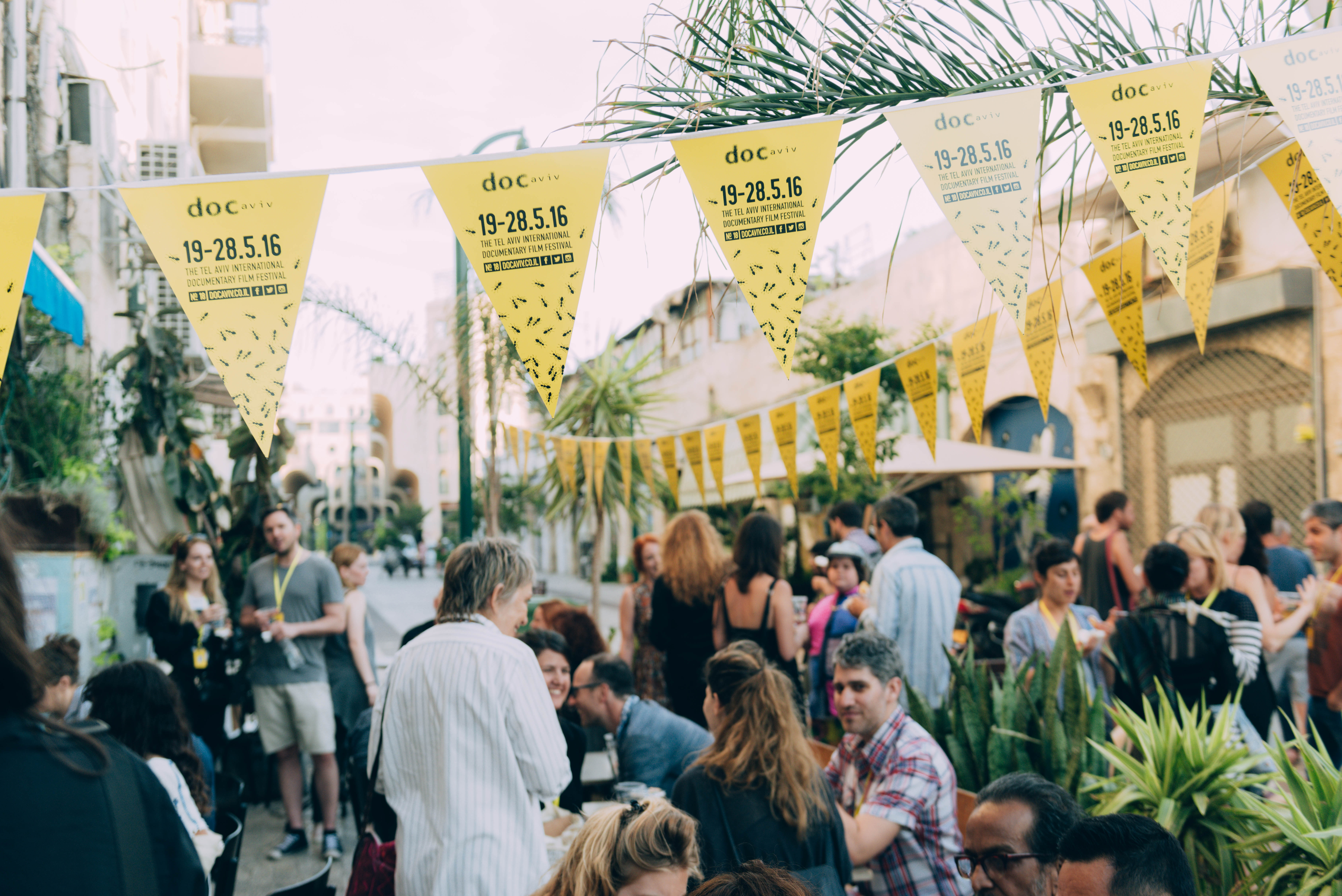 אירועי דוקאביב 2016 בתל אביב